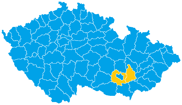 Volby do Sněmovny národů Federálního shromáždění v roce 1990 - vítězné strany podle okresů (světle modrá Občanské fórum, zlatá Hnutí za samosprávnou demokracii - Společnost pro Moravu a Slezsko)